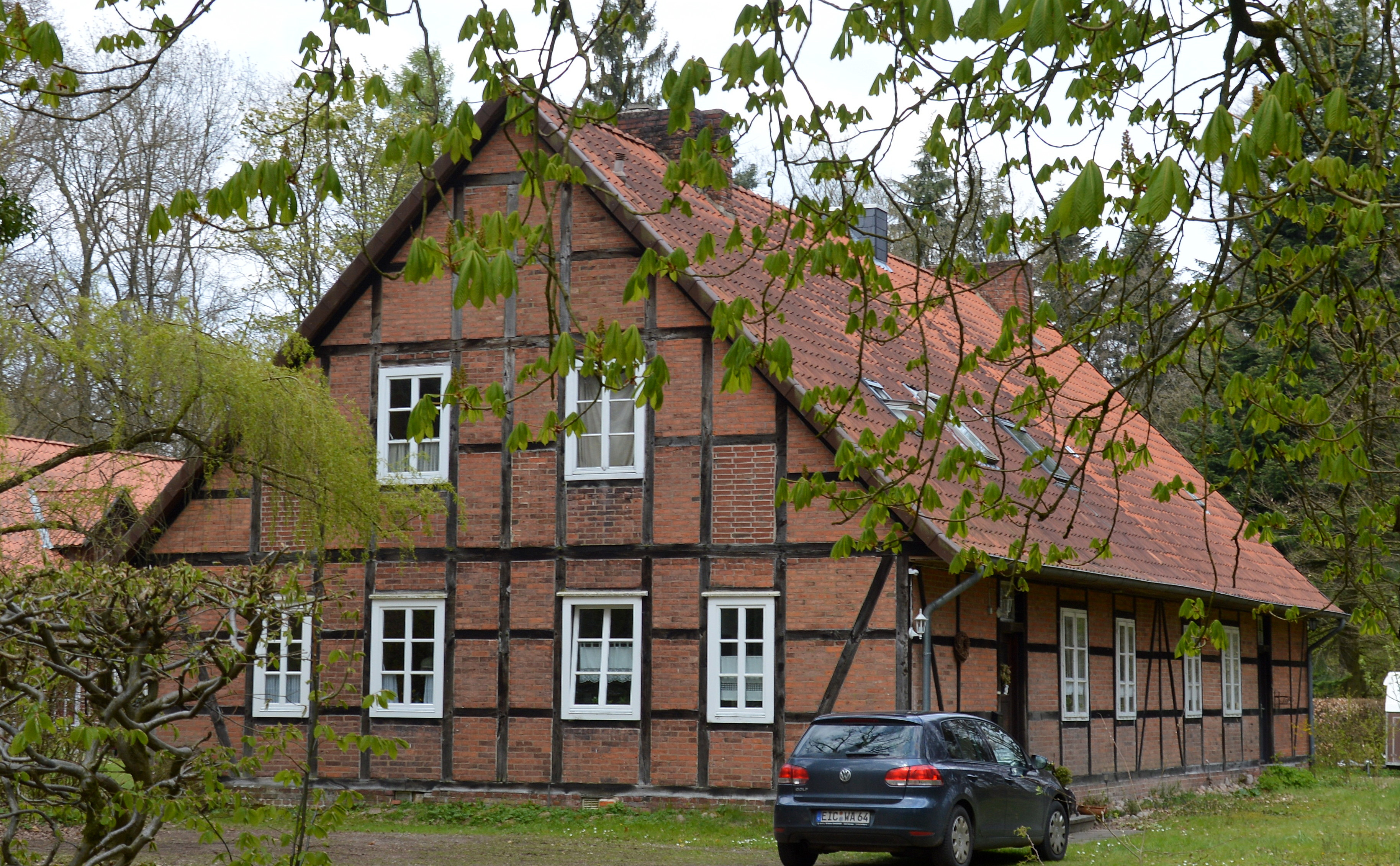 Sellhorn 3